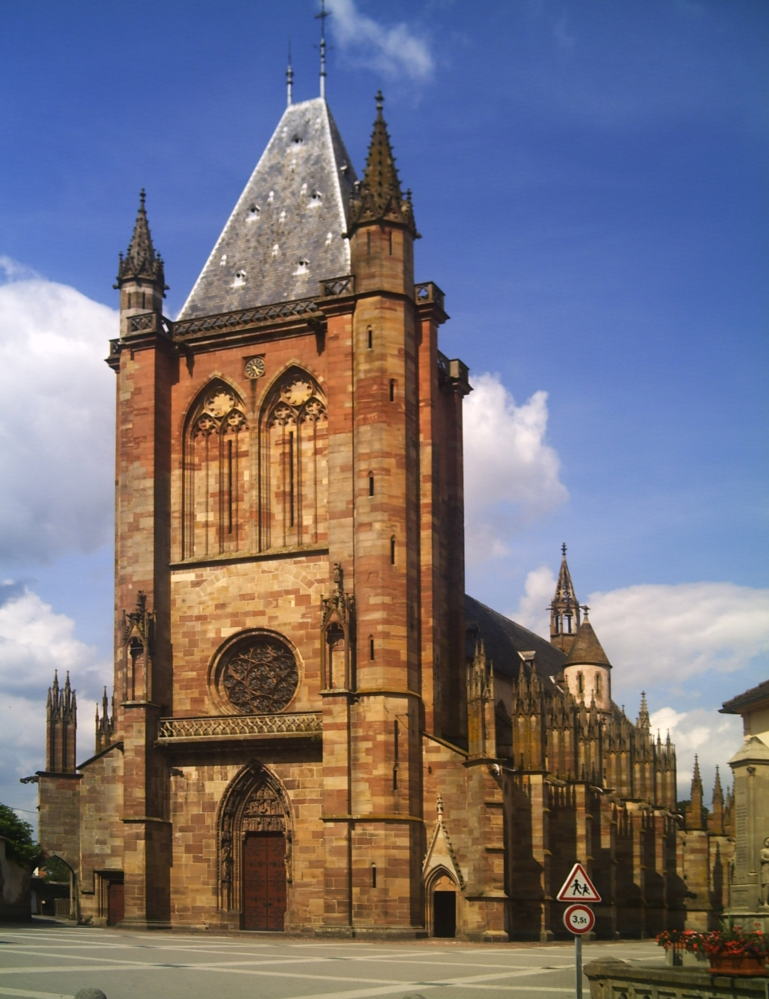 Eglise St Florent